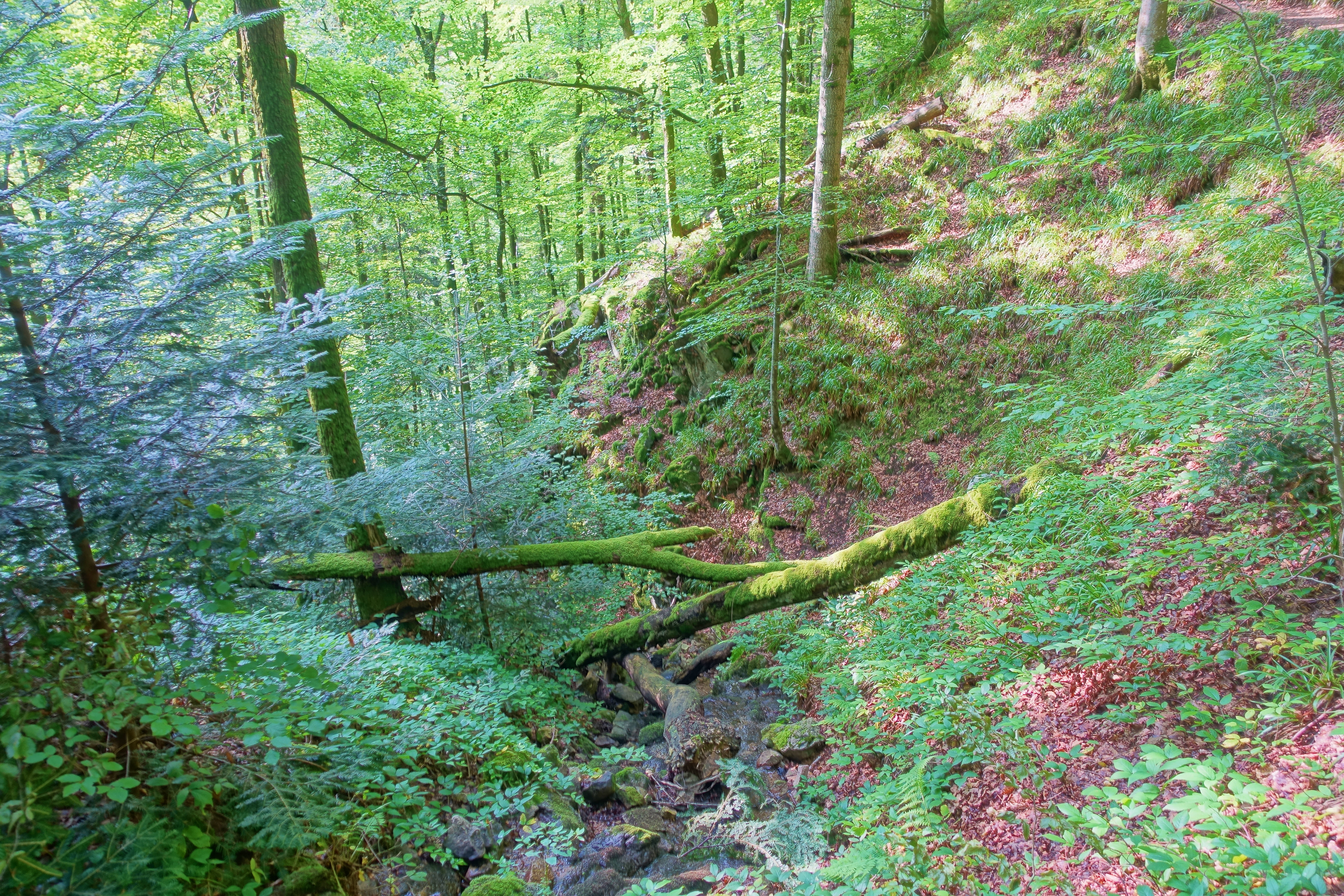 Naturhafter Landschaftsteil von besonderer Eigenart und Schönheit.